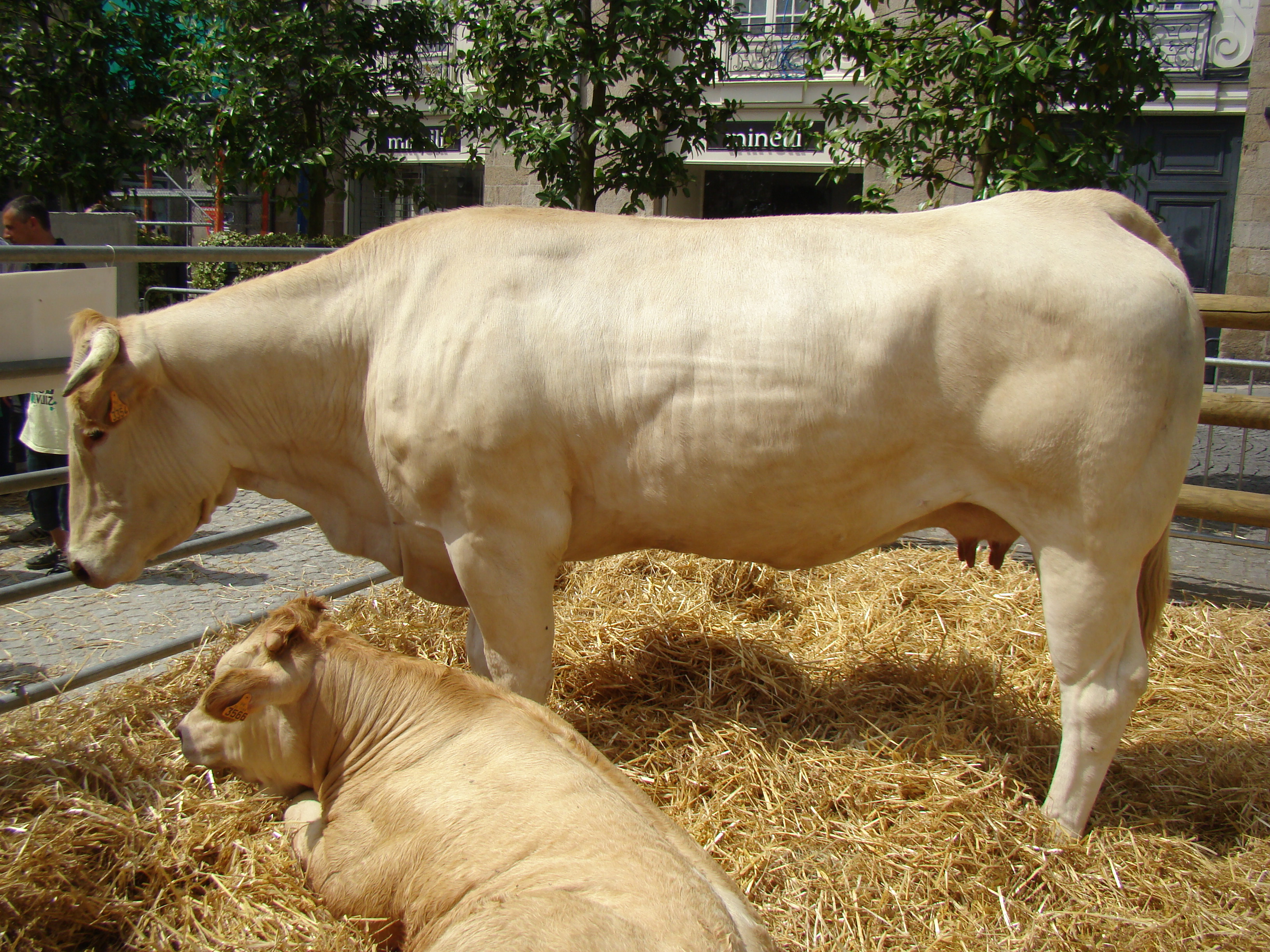 Une blonde d'Aquitaine et son veau à La ferme en ville